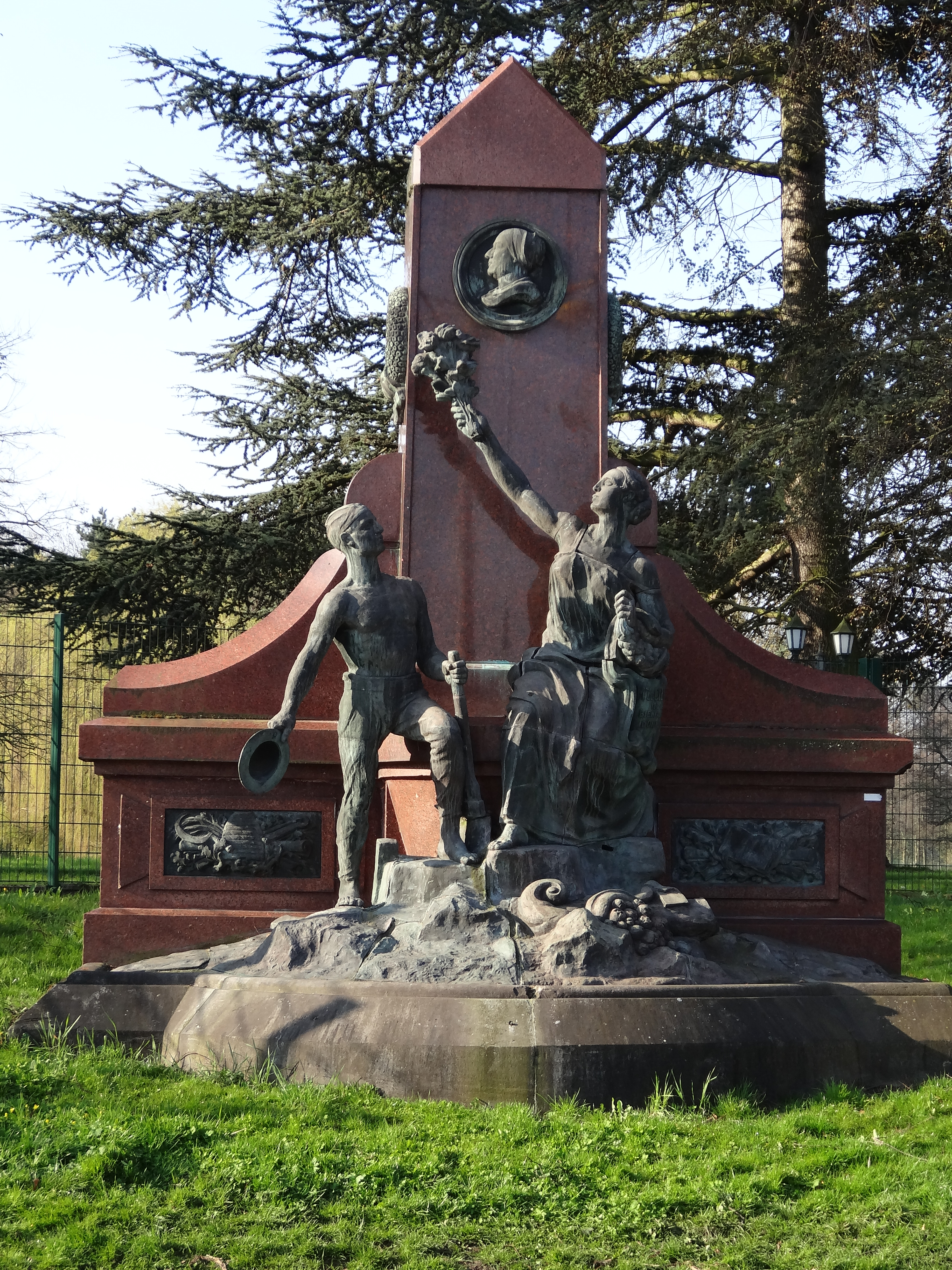 Monument de la Découverte du Charbon, ou monument à madame Declercq, Compagnie des mines de Dourges dans le bassin minier du Nord-Pas-de-Calais, Oignies, Pas-de-Calais, Nord-Pas-de-Calais, France. Ce monument est inscrit aux monuments historiques le 26 avril 2011 et inscrit sur la liste du patrimoine mondial de l'Unesco le 30 juin 2012 et y constitue le site no 41.